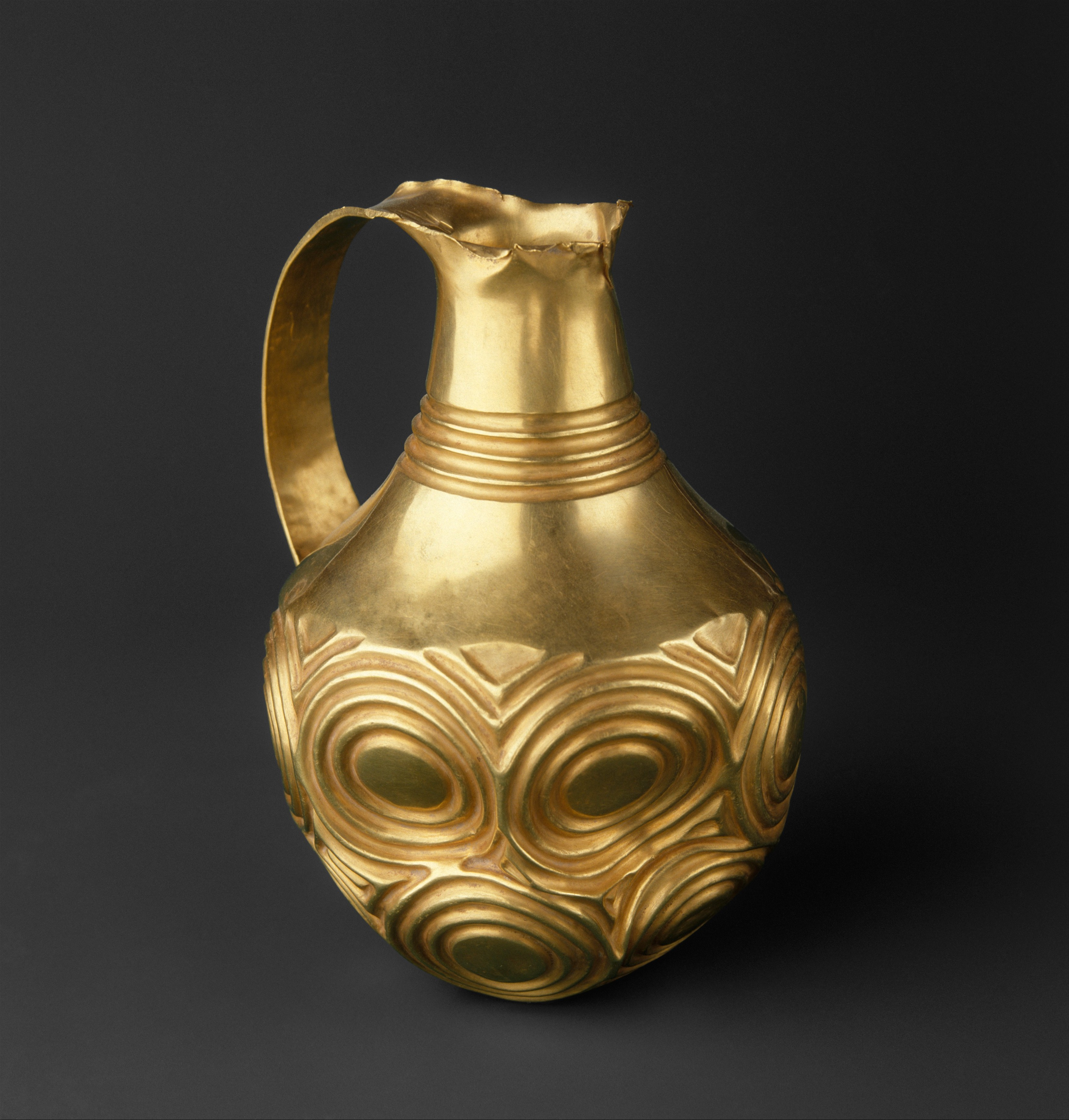 Hattian; Ewer; Metalwork-Vessels